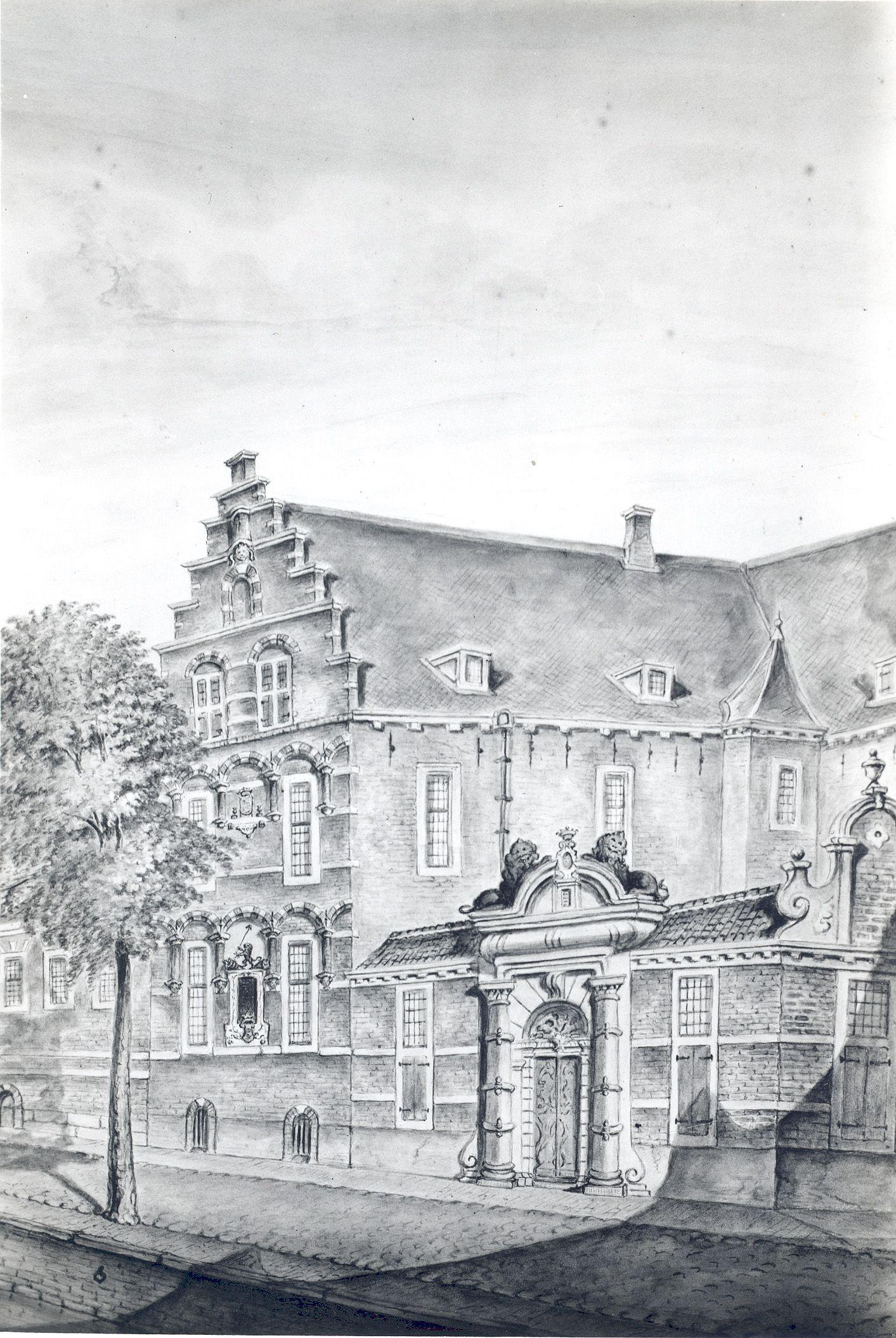 It lânskipshûs yn Ljouwert, ôfbrutsen yn 1849